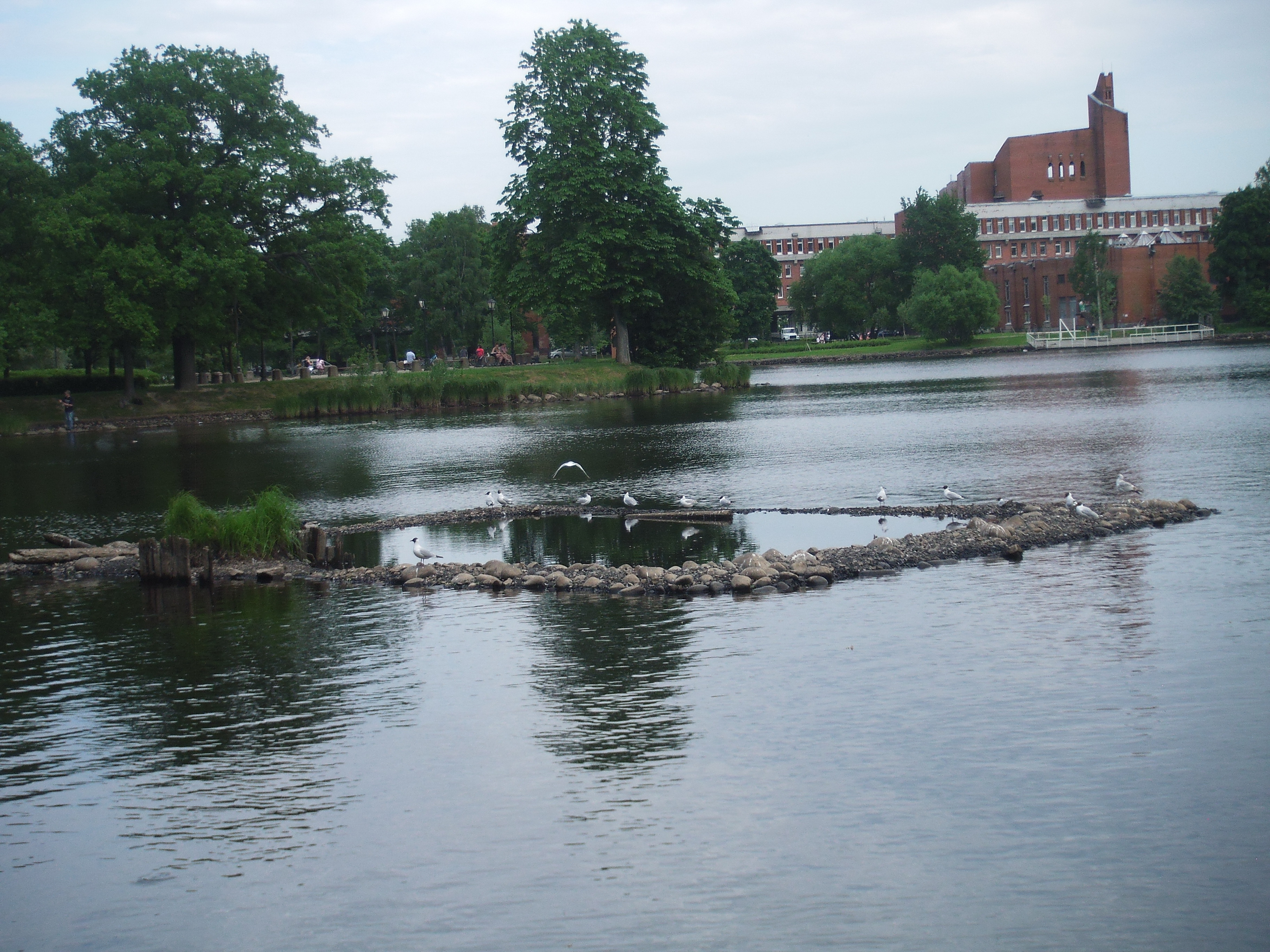 Сестрорецк СПб. Остатки от бывшего водозабора СИЗ им. Воскова. До 1917 года на этом месте стояла часовня "Иордан"